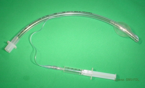 Geblockter Endotrachealtubus